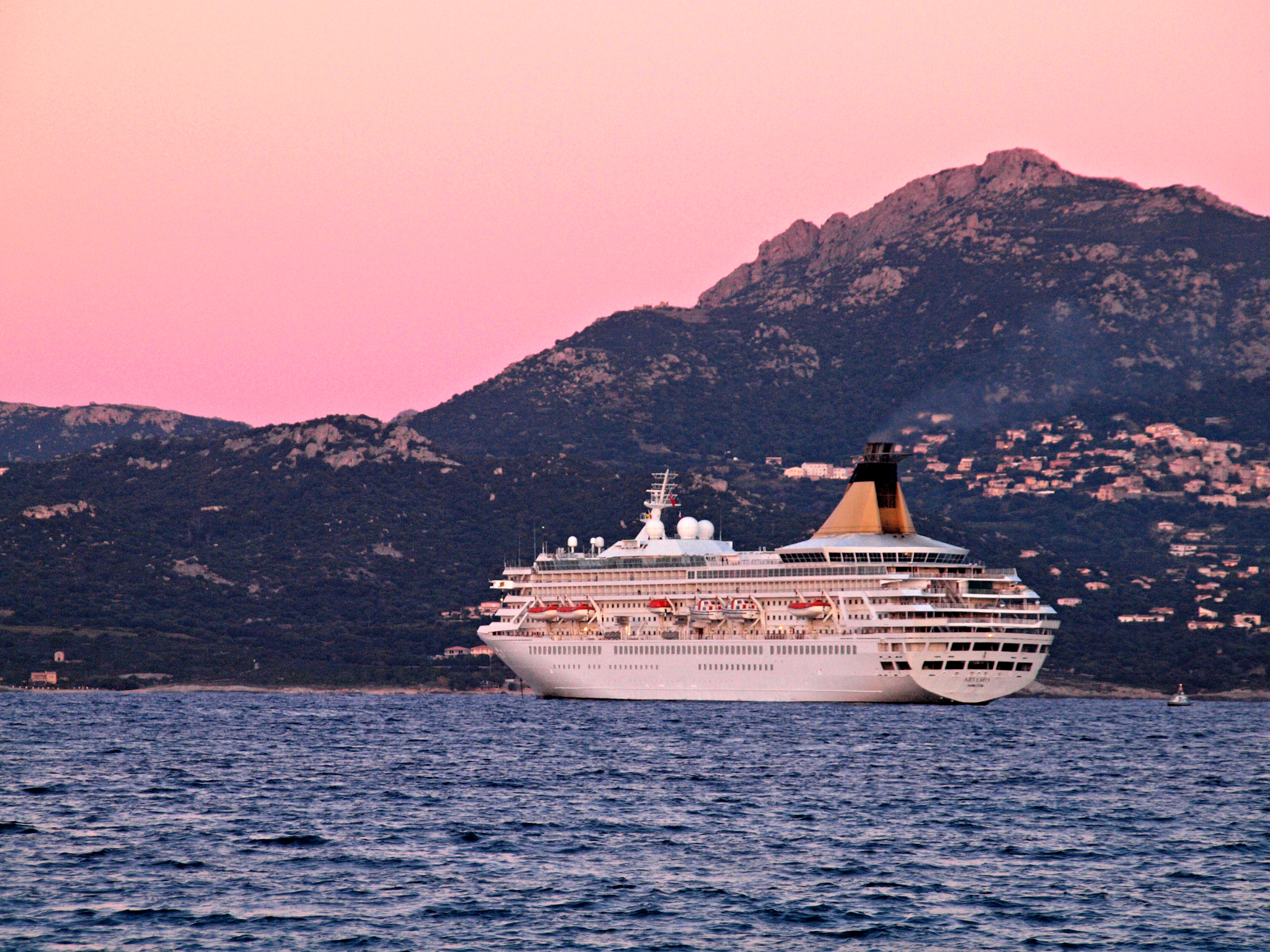 Calvi (Corsica) - MS Artemis dans la baie de Calvi